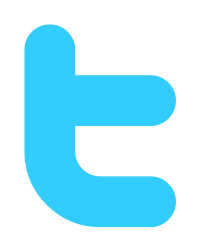 Twitter ロゴの頭文字のみのバージョン